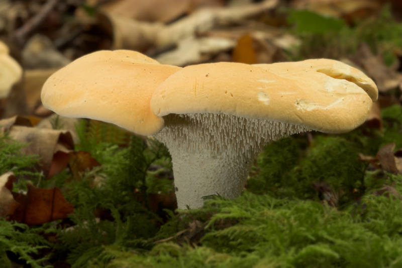 Hedgehog Fungus, Hydnum repandum